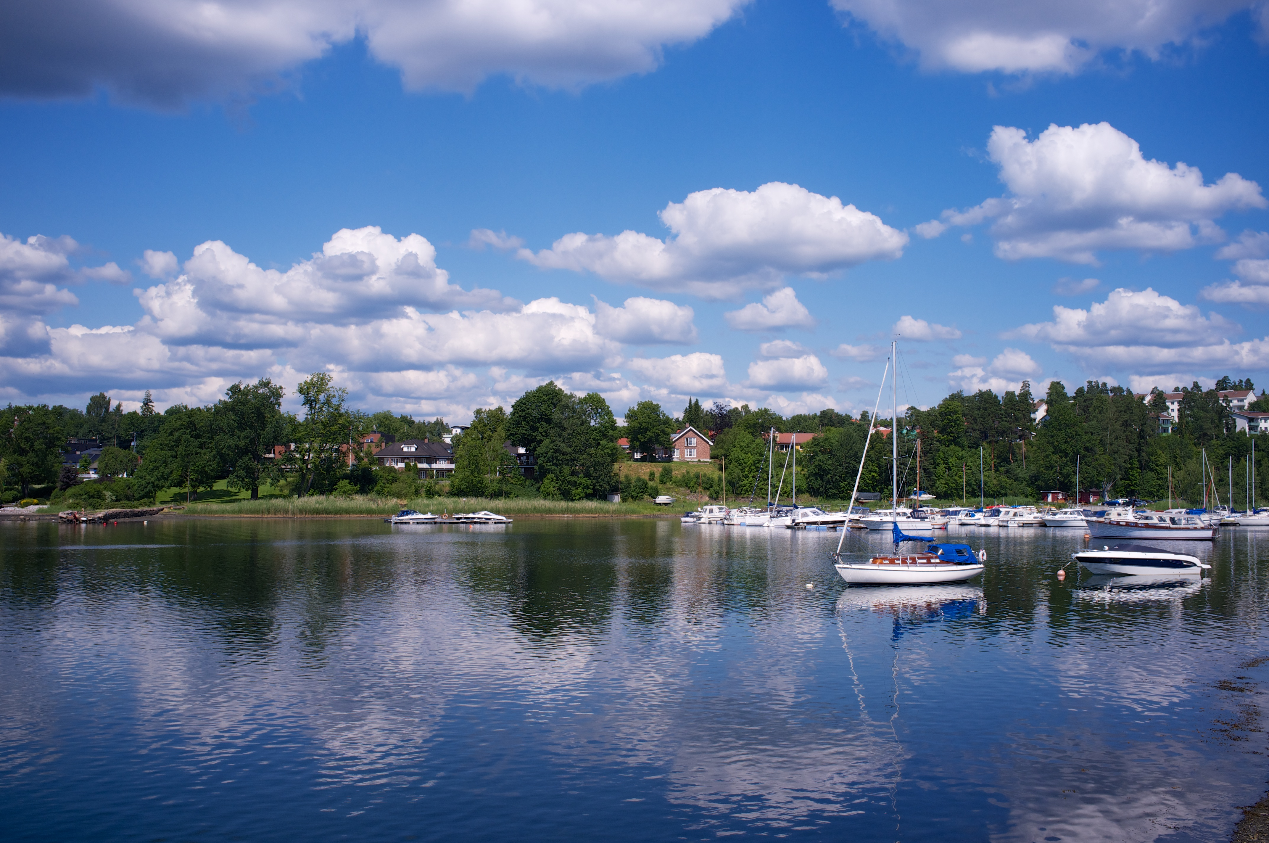 Holtekilen i Bærum